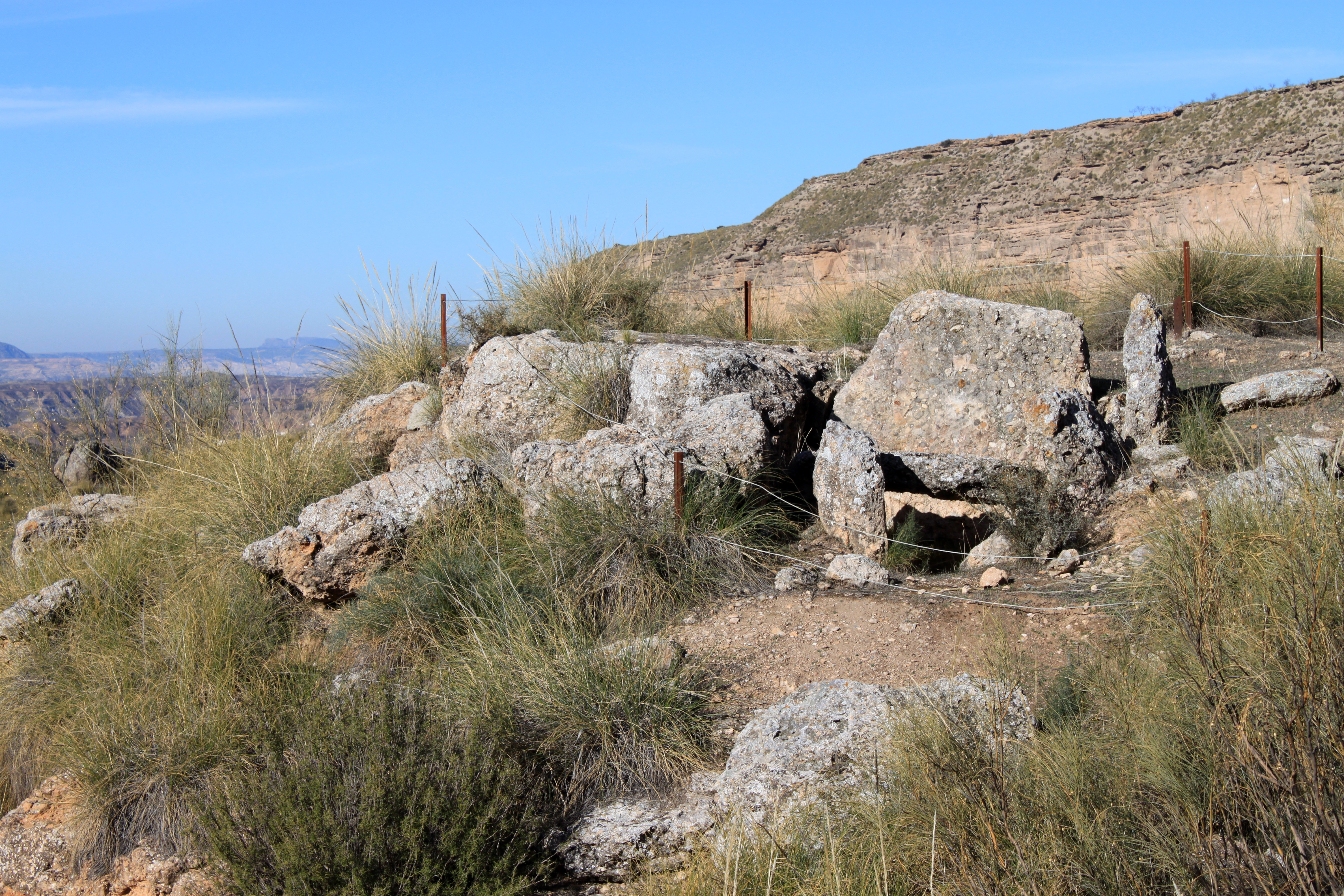 Dolmen 141 del Parque Megalítico de Gorafe situado en la Hoya del Conquil. Gorafe, provincia de Granada, Andalucía, España.